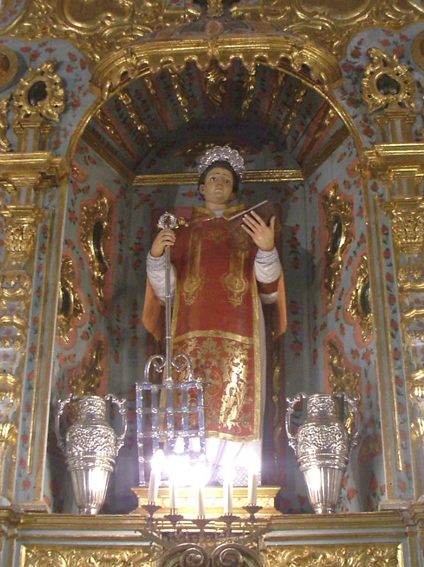 Imagen de San Lorenzo, patrono de Guájar Faragüit (Granada), pueblo natal de Antonio Cano, realizado en 1939.